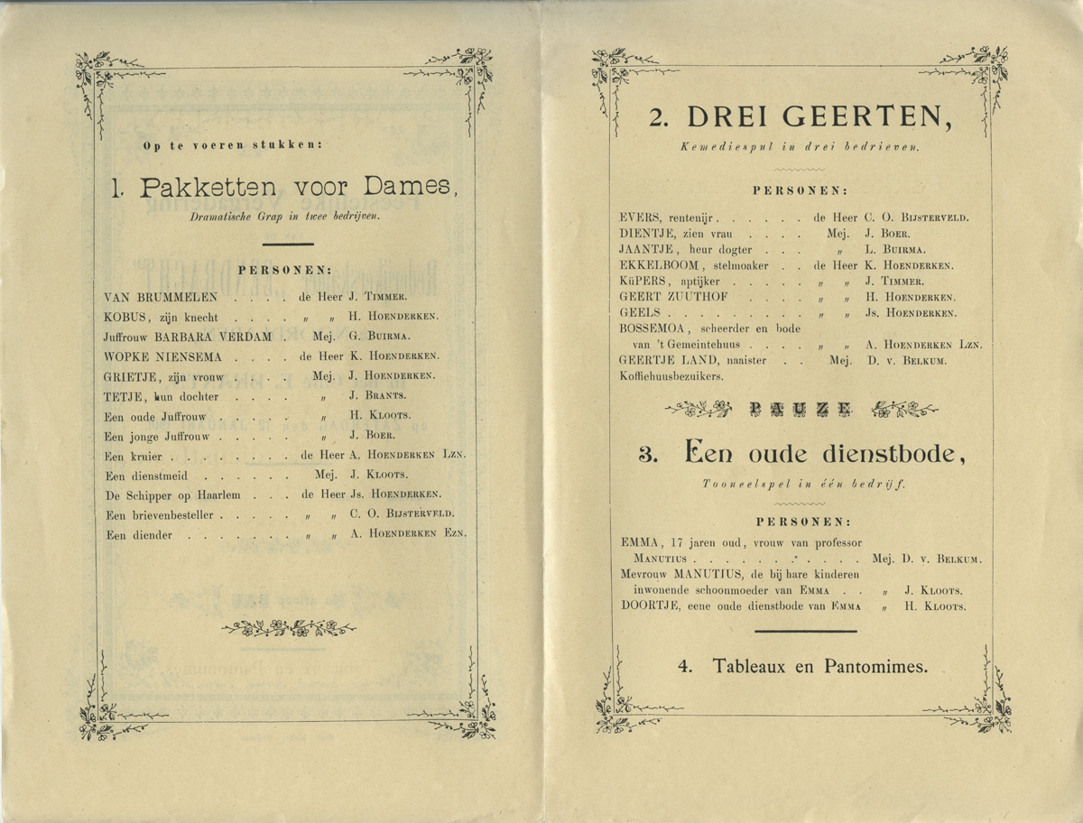 Toneelprogramma van De Rederijkers uit het Groningse dorp Noordlaren van 12 januari 1901